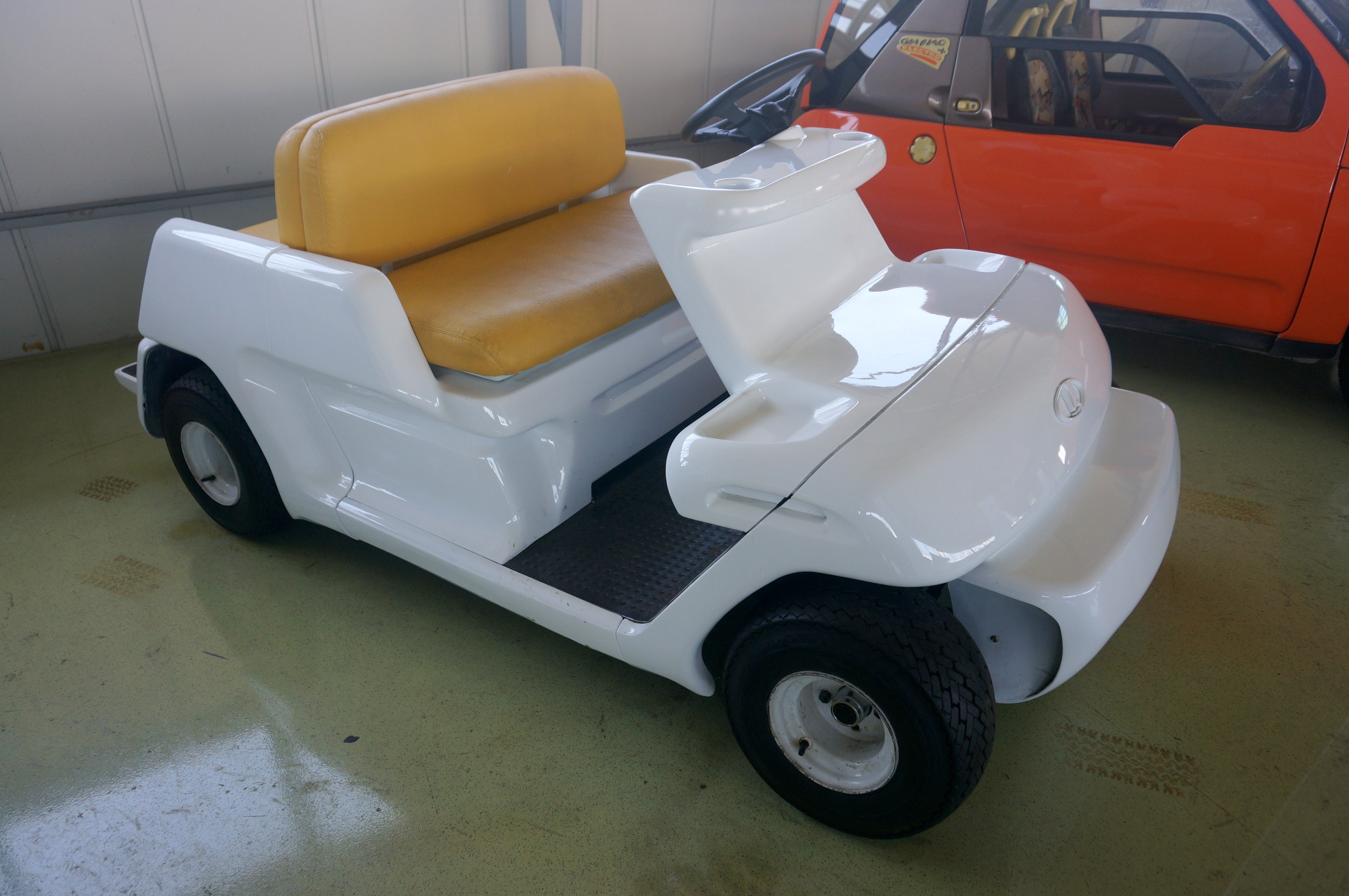 Лада "Гольф" (ВАЗ 1004). Электромобиль